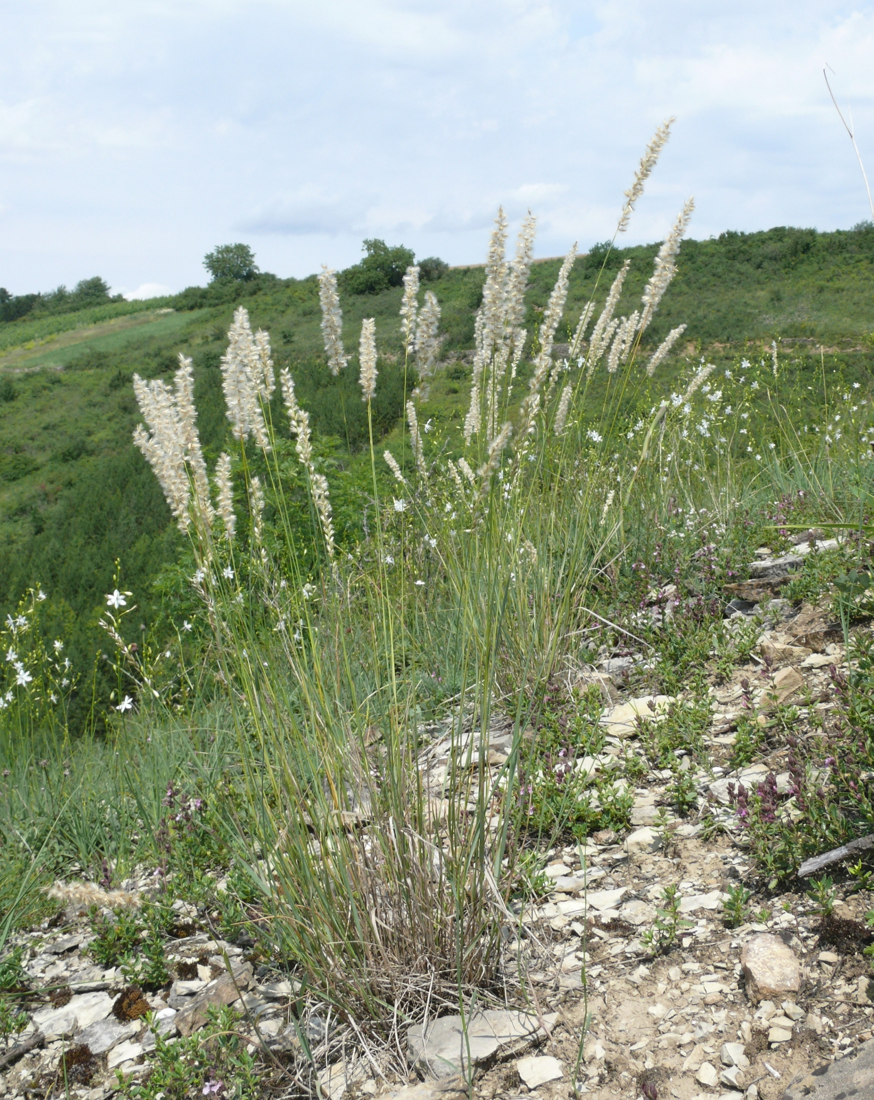 Melica ciliata in a "Teucrio-Melicetum ciliatae", Tauberland, Germany